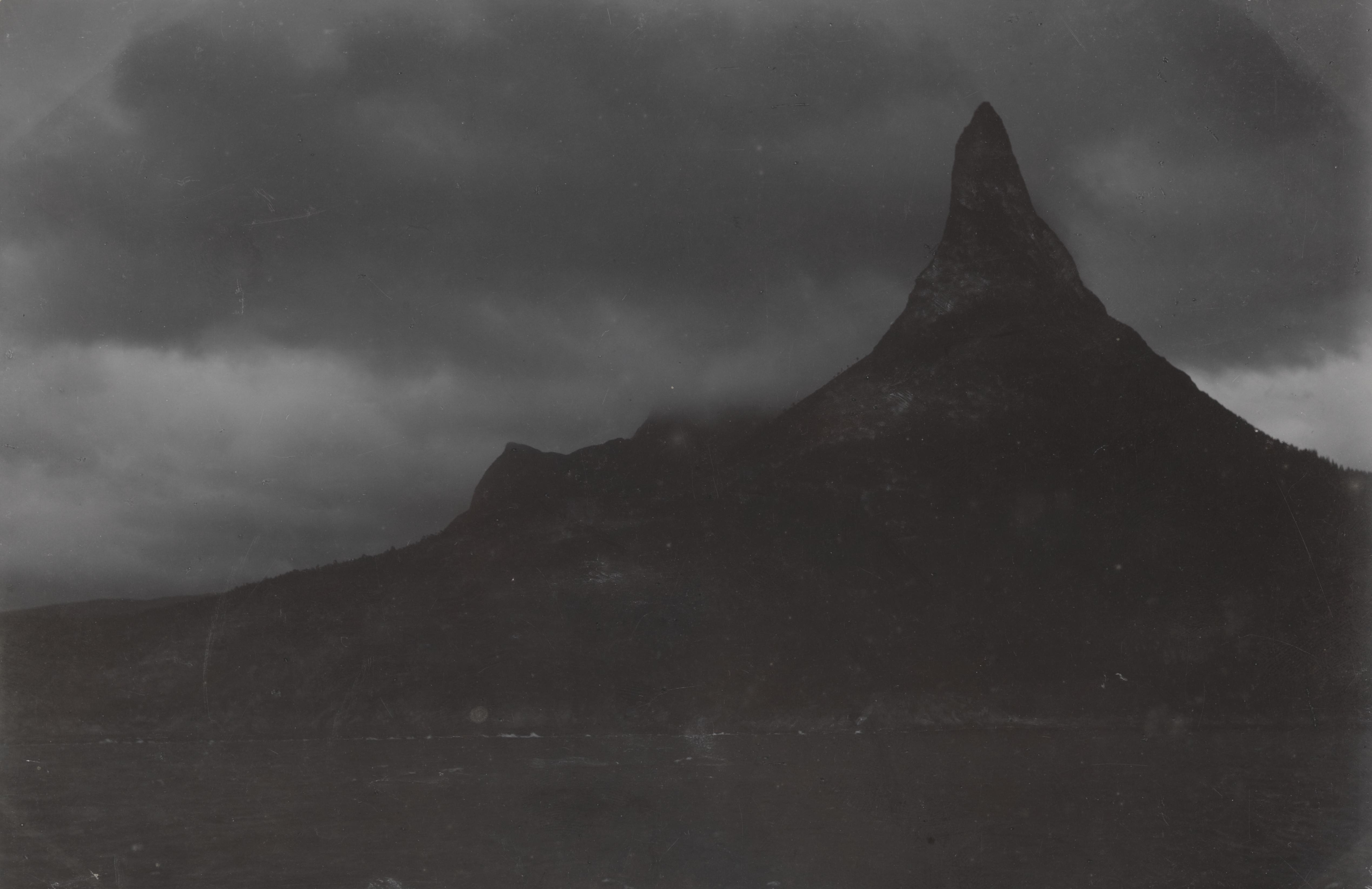 Bildet er hentet fra Nasjonalbibliotekets bildesamling